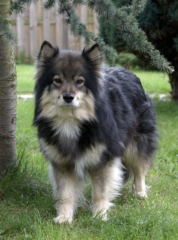 Finse Lappenhond Louhi